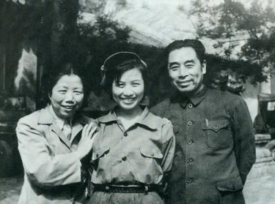 孙维世周恩来合照